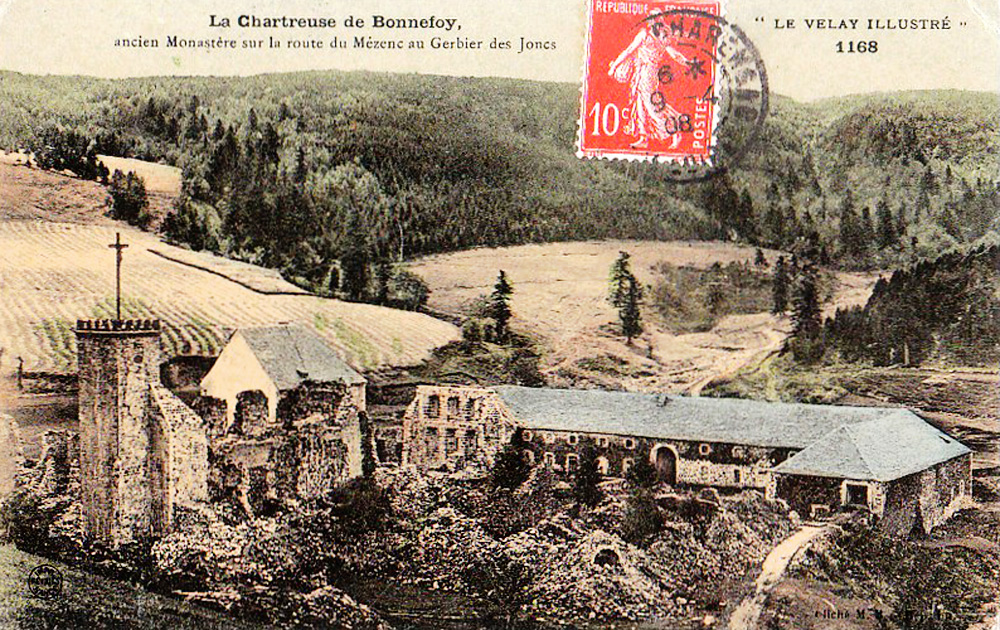 Chartreuse de Bonnefoy sous la neige